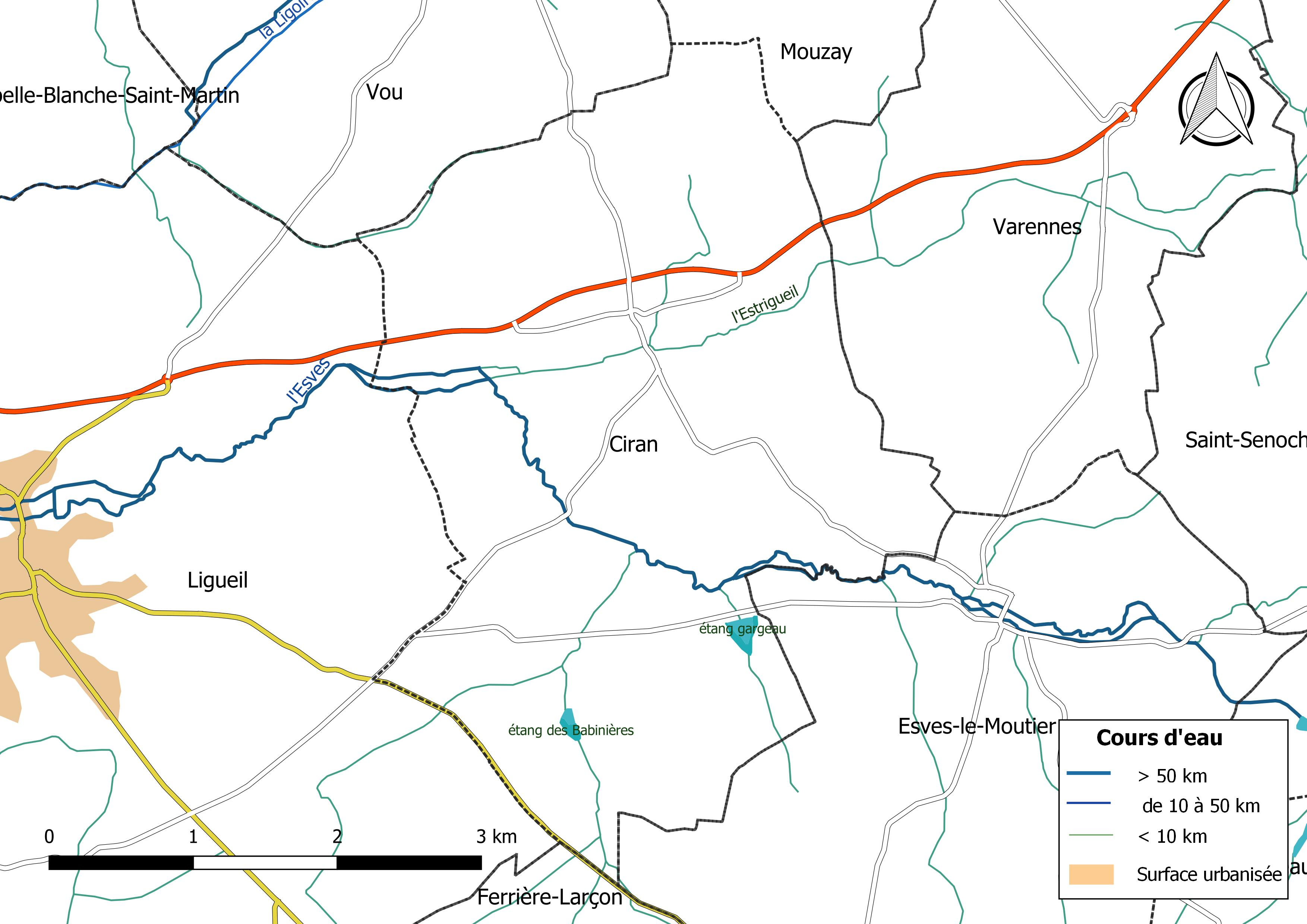 Carte du réseau hydrographique de la commune de Ciran (France).